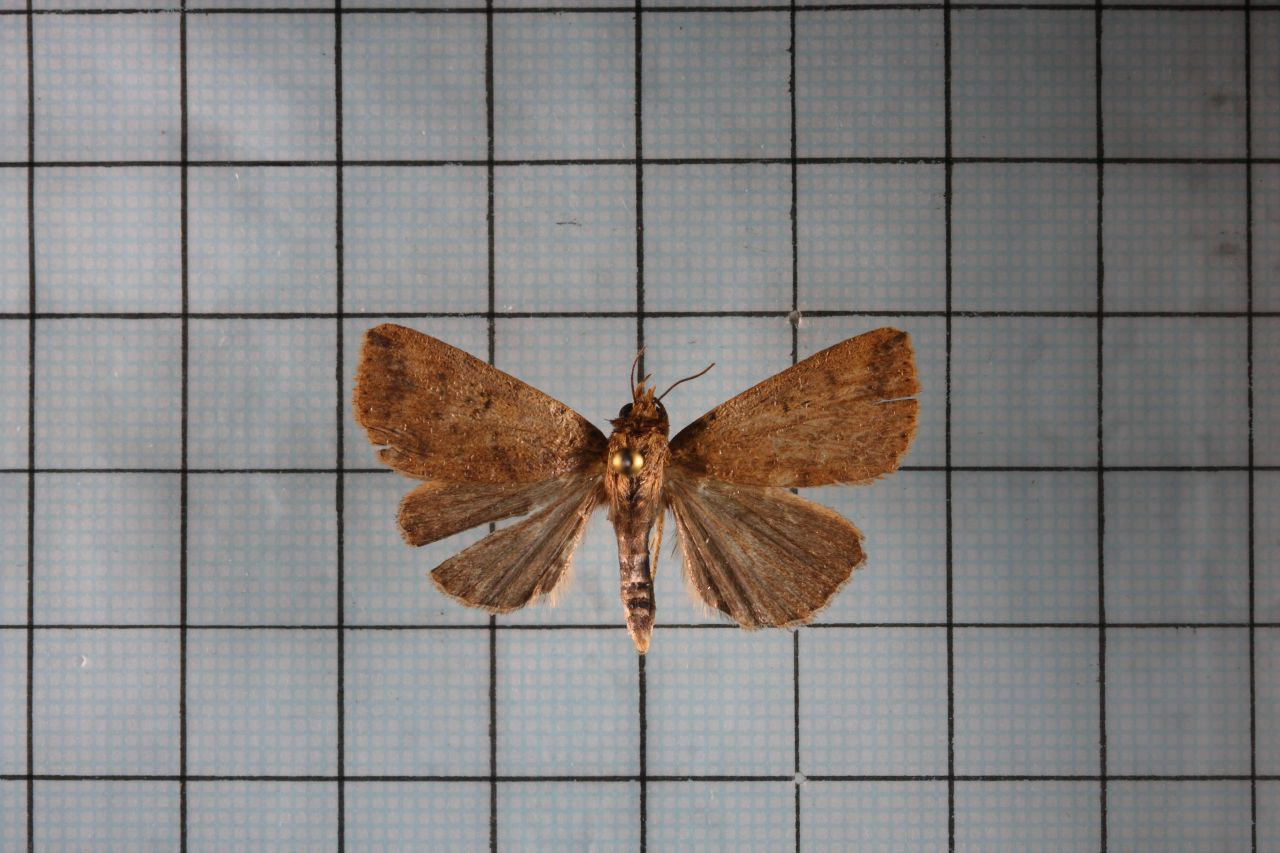 Xylostola indistincta (Moore,1882) 矇紋夜蛾 認識台灣的昆蟲 17: P.78 鞍1:P.88,Pl.25-15